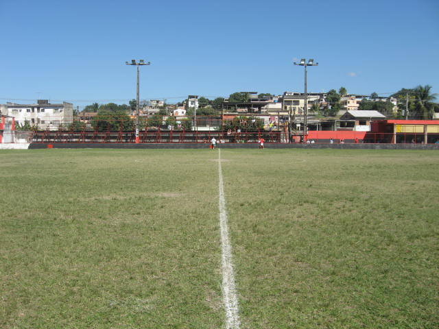 Estádio José Amorim Pereira, da União Esportiva Coelho da Rocha, de São João de Meriti, RJ